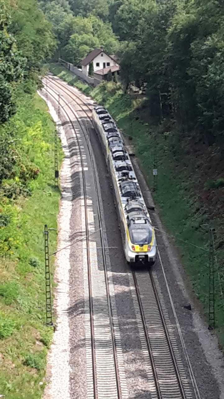 Einschnitt des ehemaligen Kaufwaldtunnels der Gäubahn, Standort Brücke der Römerstraße, Blickrichtung Ost (Vaihingen), mit Elektrotriebzug der Baureihe 442 (Bombardier Talent 2)